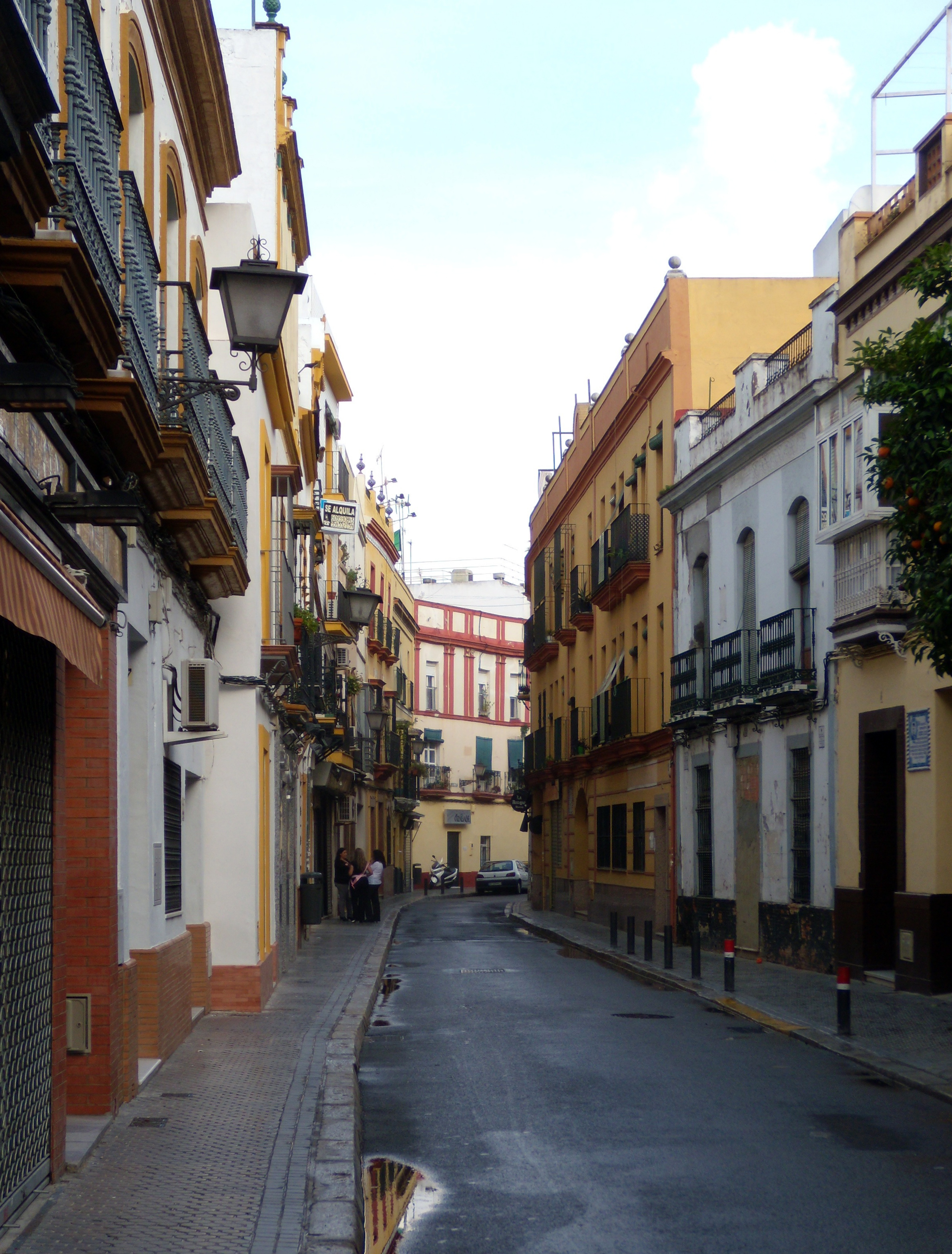 La rue Pureza (quartier de Triana, Séville, Espagne)